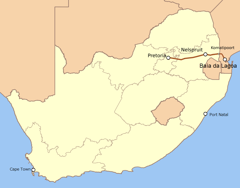 Netherlands-South African Railway Companyの路線図(1894年)。 File:Shosholoza Meyl main stations 2010.svgを修整して作成。